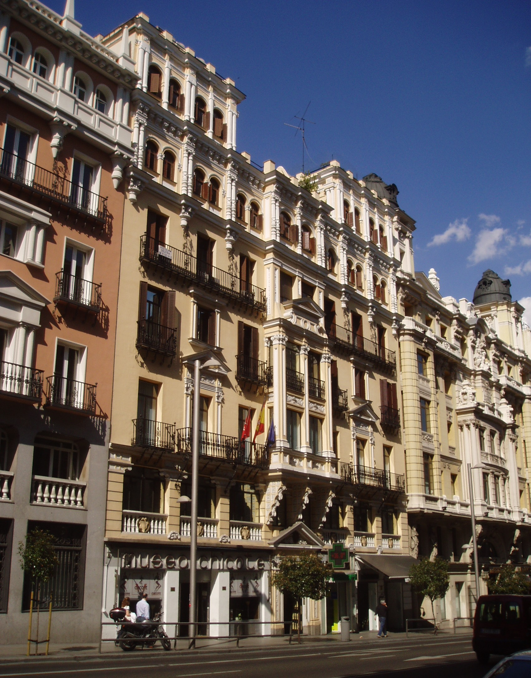 Gran Vía 12. Chicote. Madrid. España